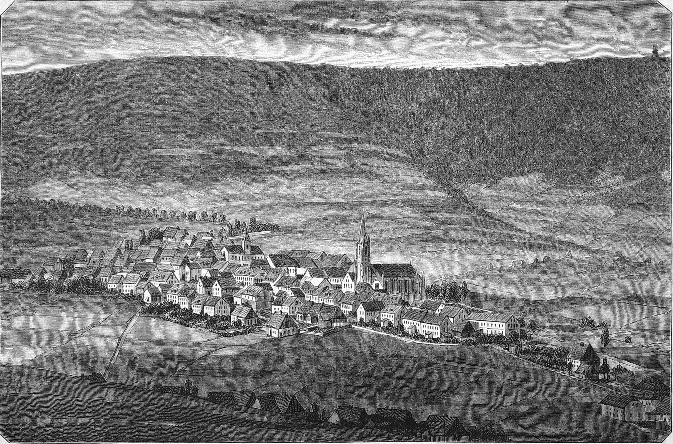 Bild aus Seite 185 in "Die Gartenlaube". Image from page 185 of journal Die Gartenlaube, 1879.